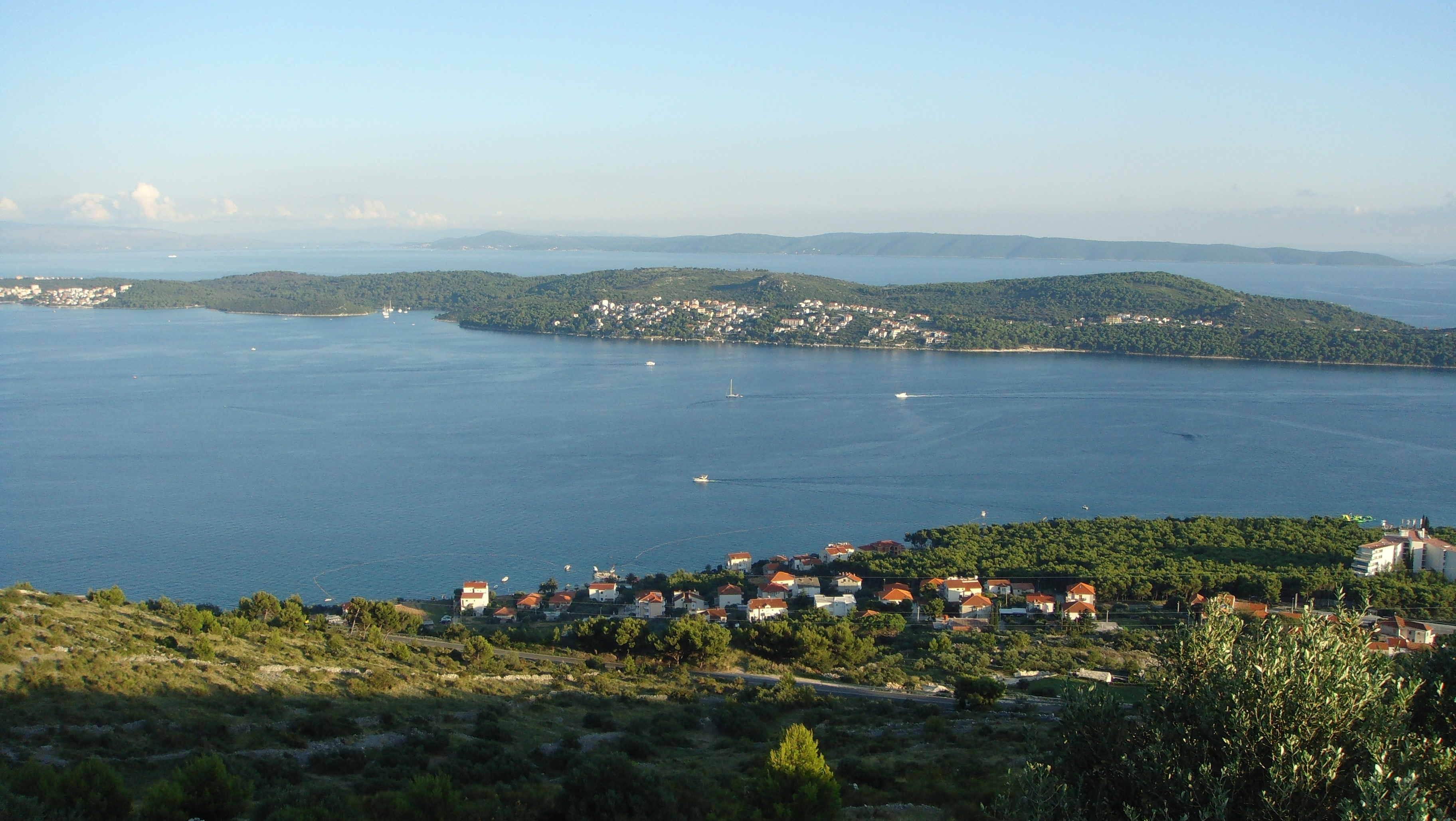 21220, Seget Donji, Croatia